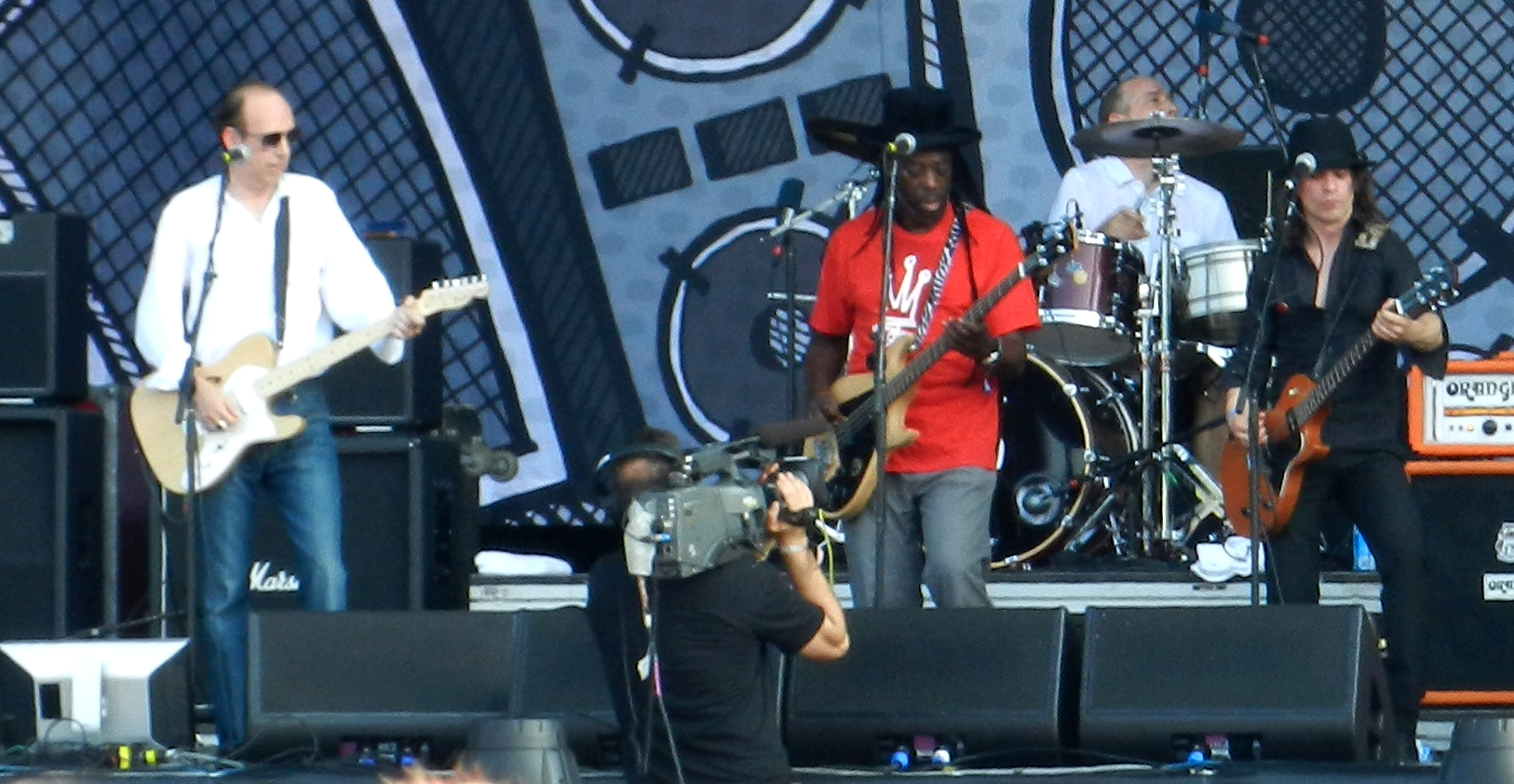 Big Audio Dynamite @ lollapalooza 2011